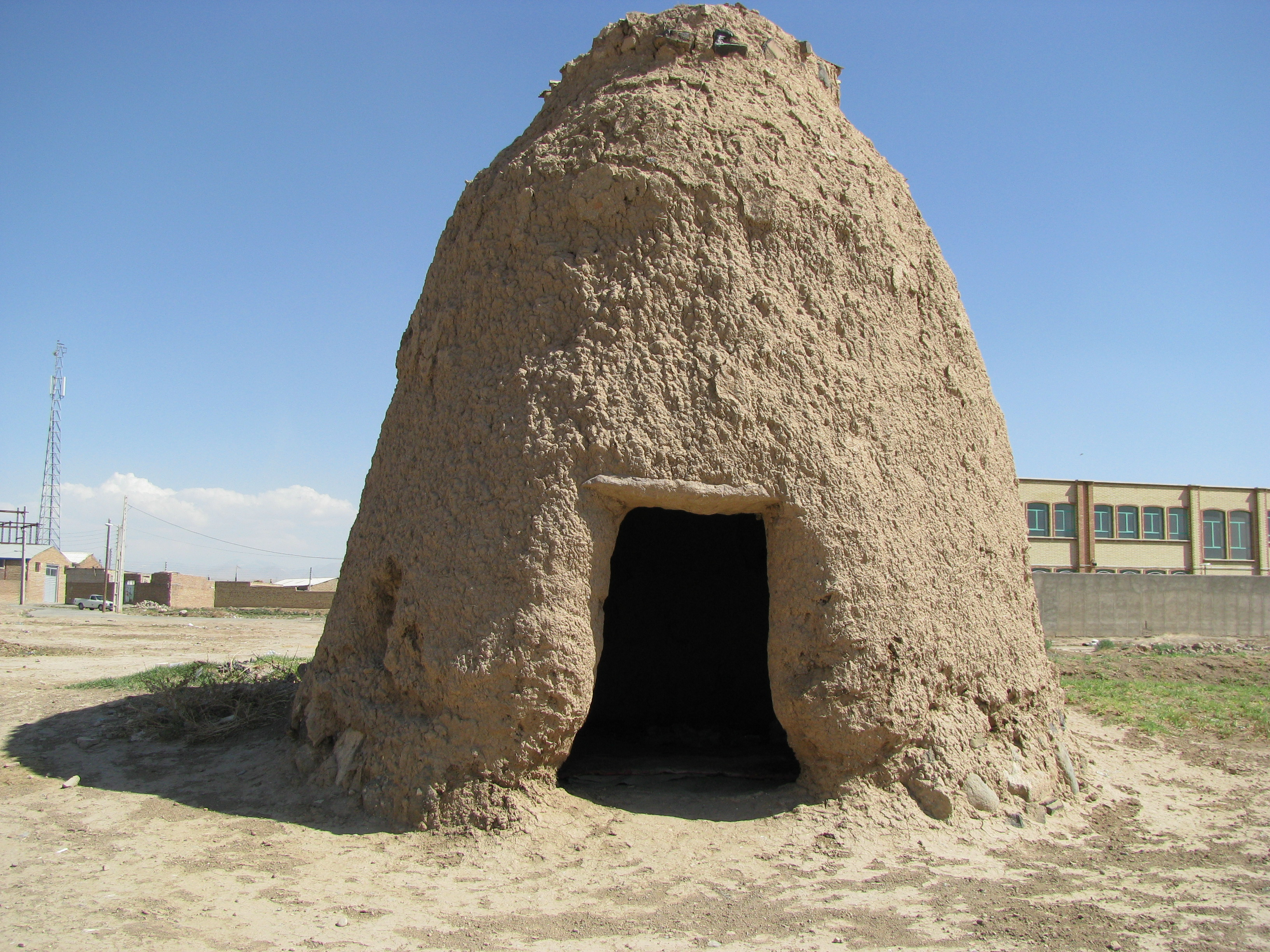 چارداخ در خرمنگاه قدیمی کوجوار